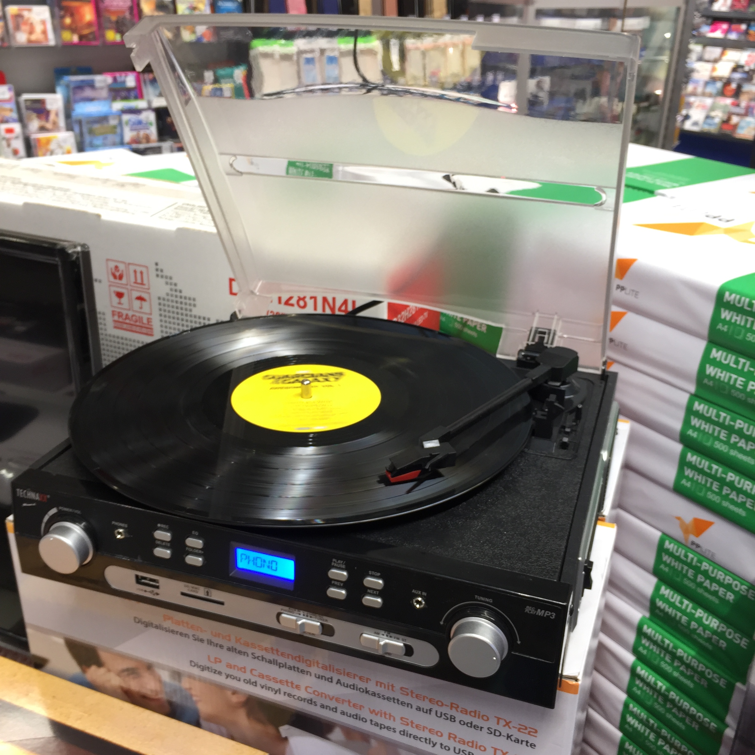 moderner Plattenspieler (2018)